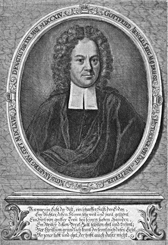 Kupferstich Gottfried Arnold (1666-1714) evangelischer Theologe